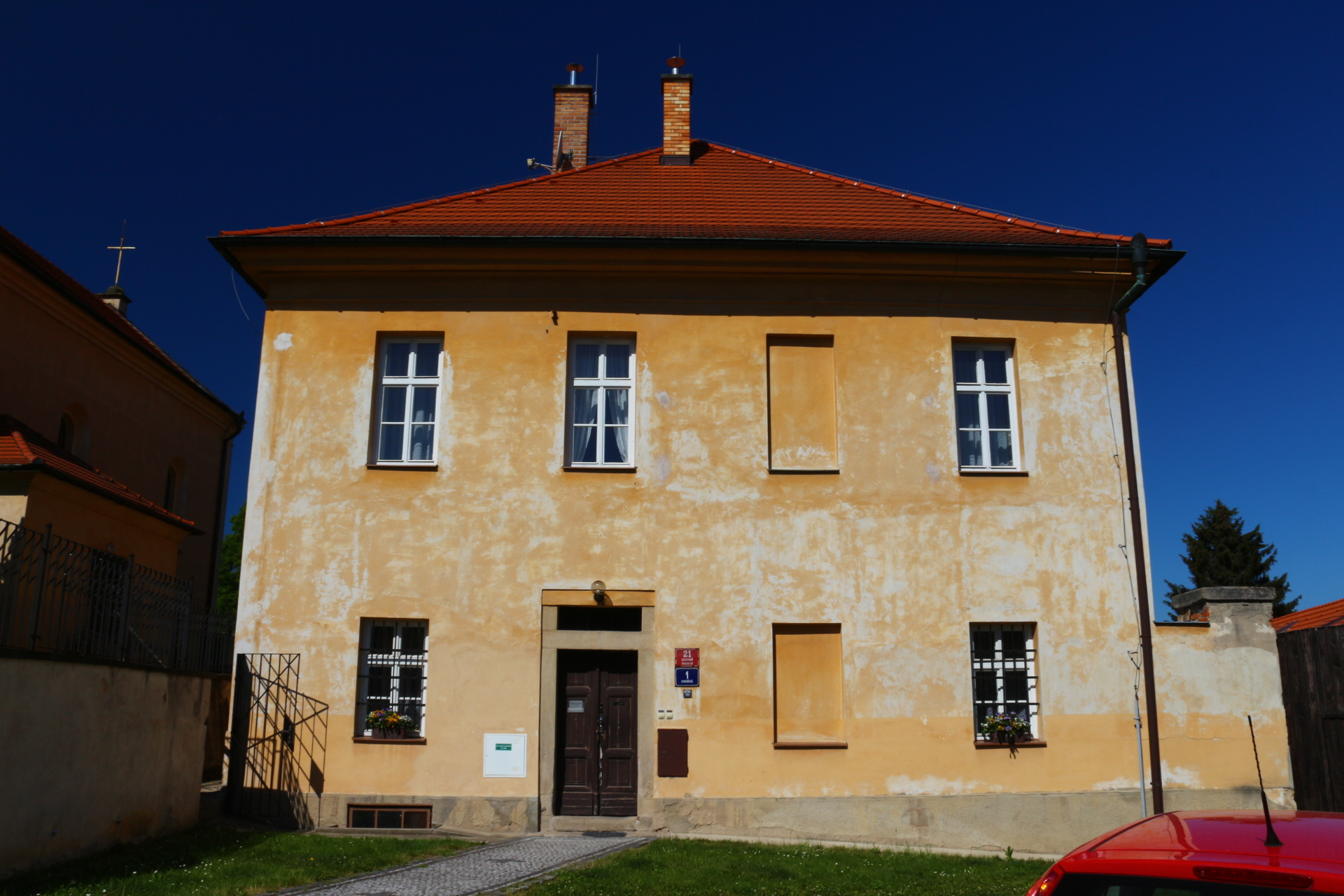 Hostivařský kostel Stětí sv. Jana